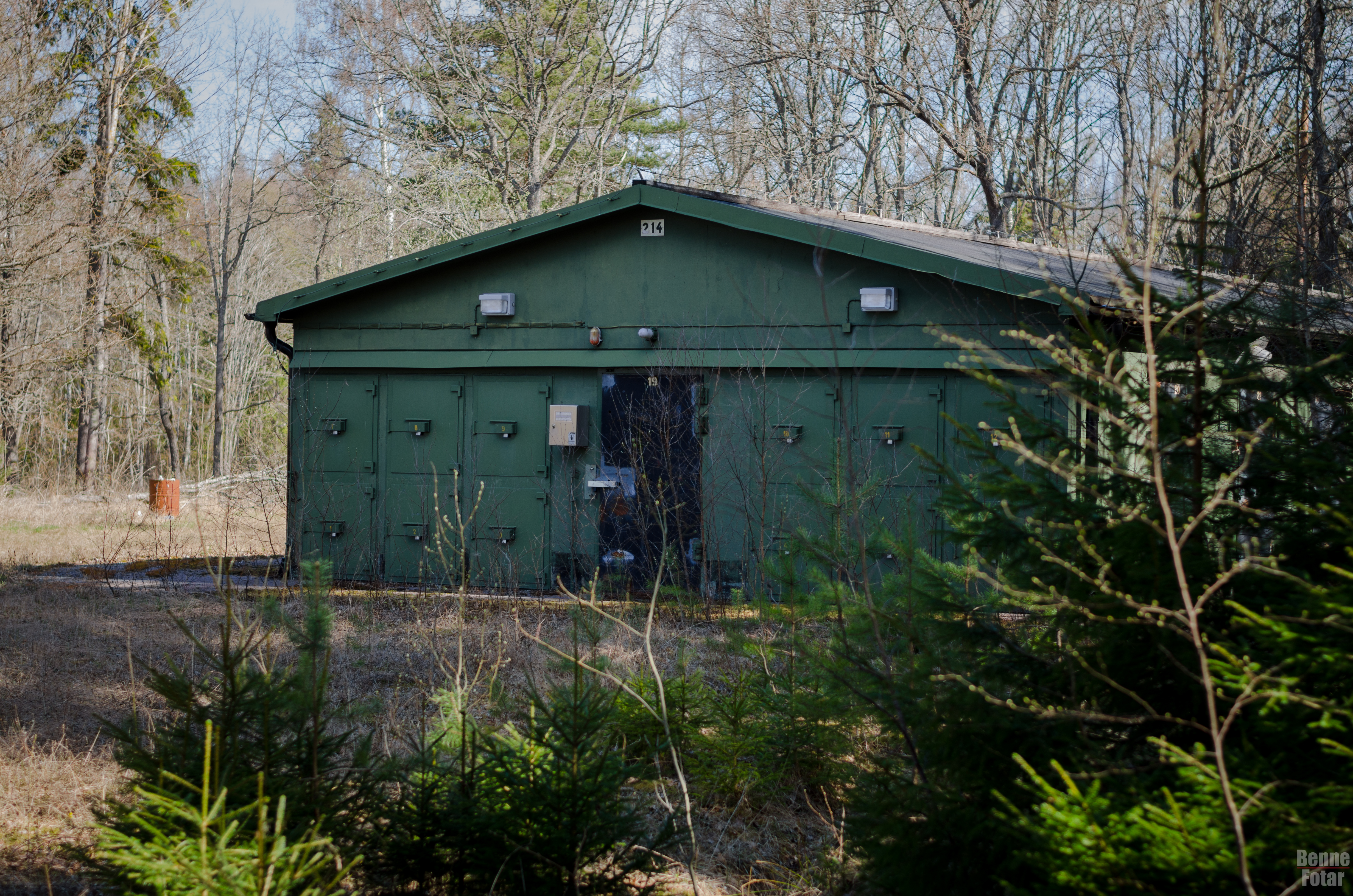 Typisk vapenkassun. Fotograferad av Benne